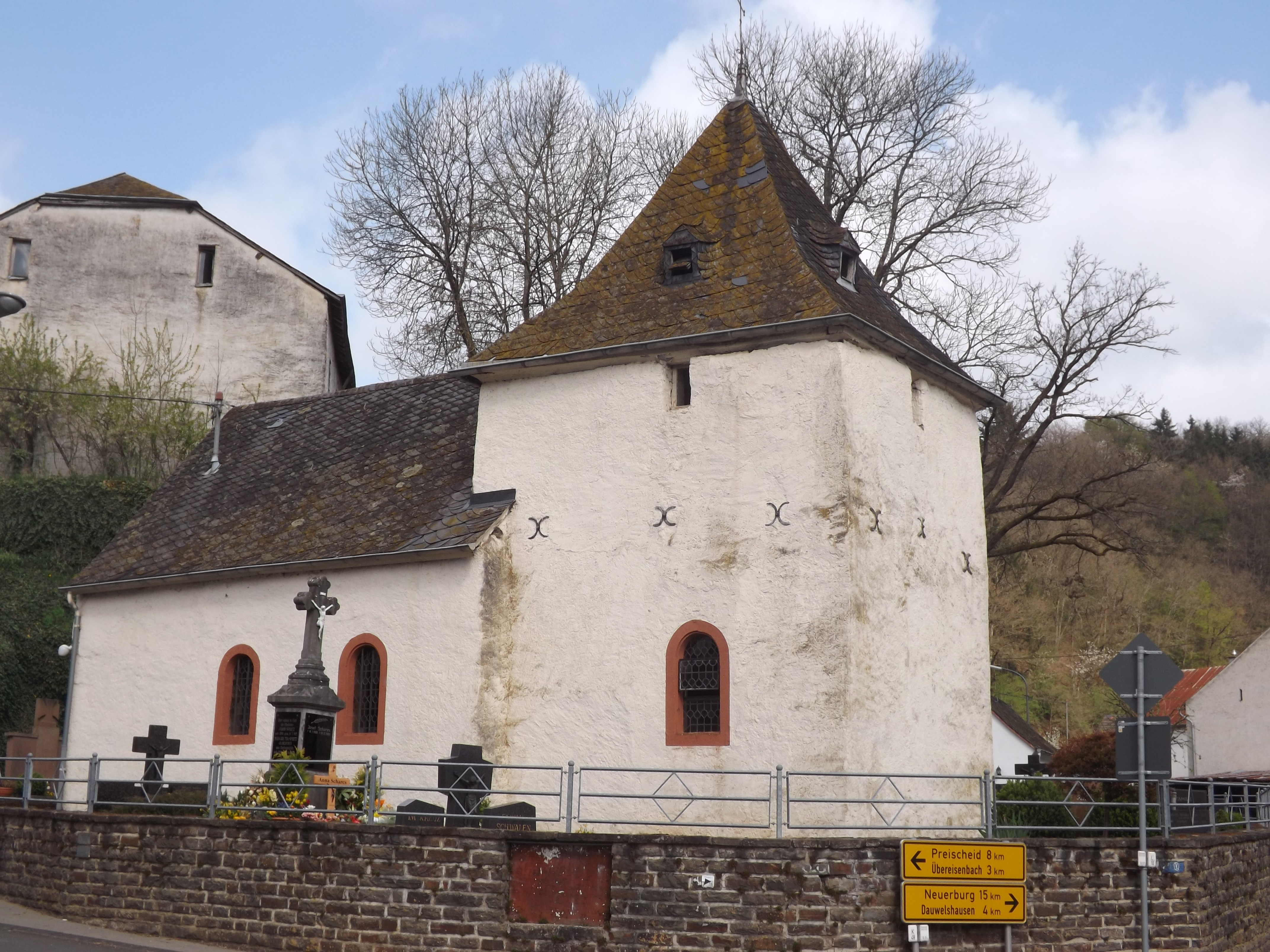 Ausenansicht der Kirche